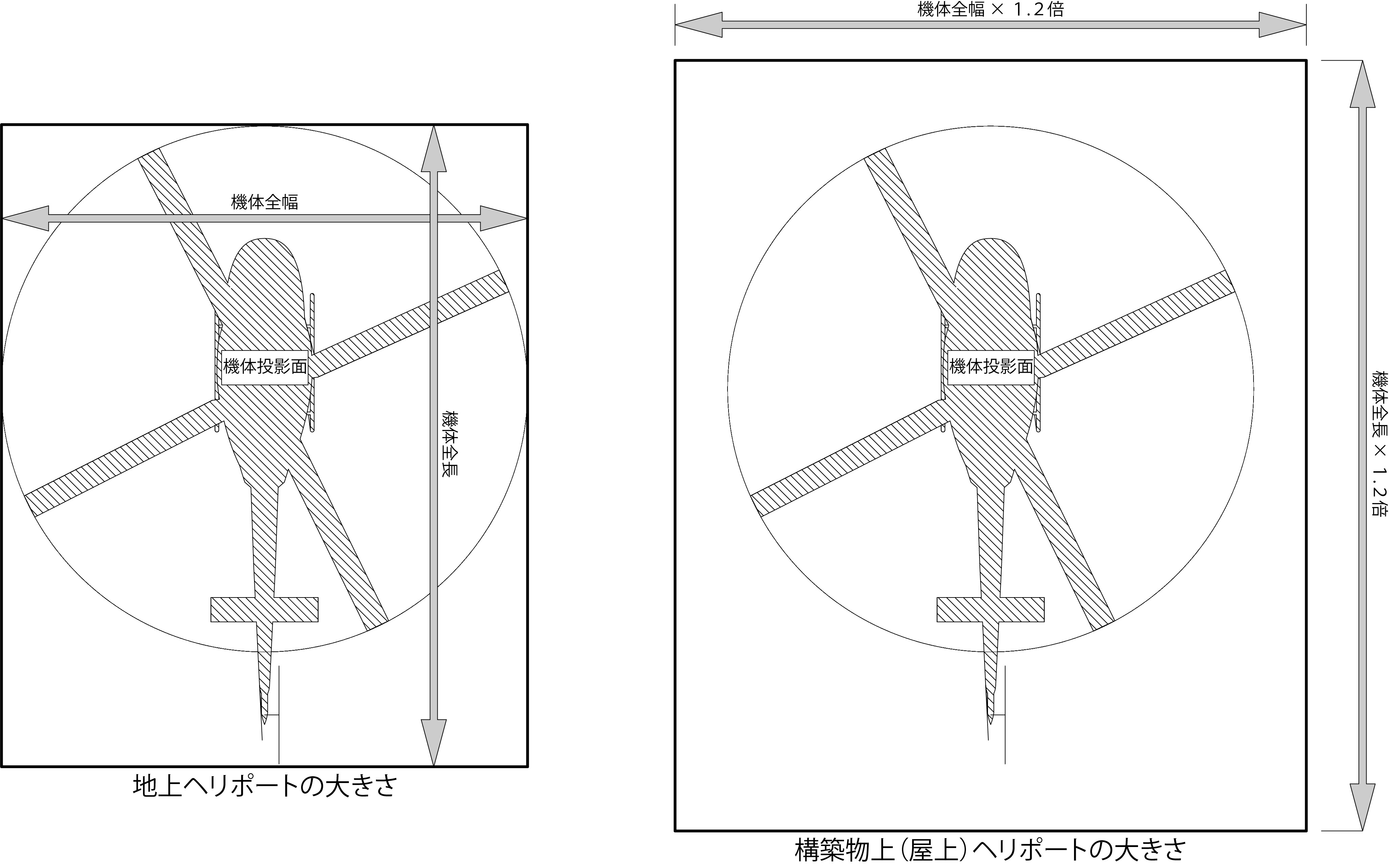 日本におけるヘリポートの大きさ（繰り返し離発着）